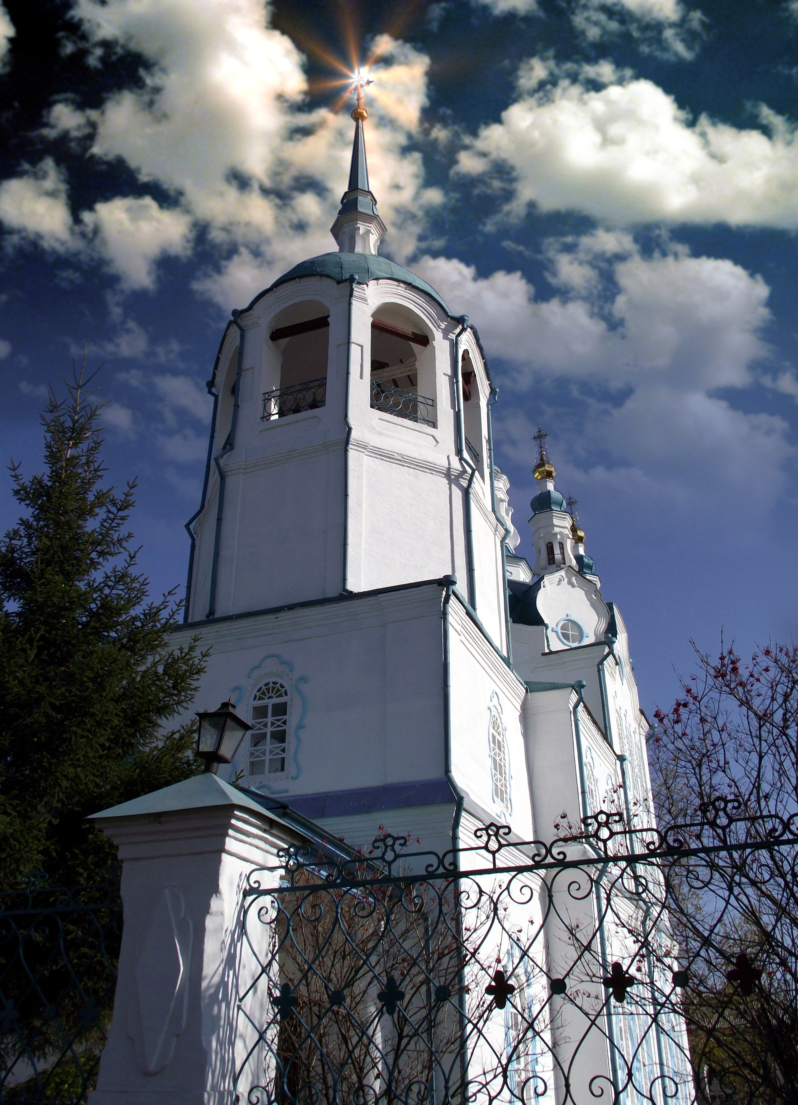 Успенский кафедральный Собор г. Енисейска